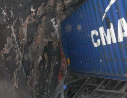 Am 1. Dezember 2015 kam es auf der Semmeringbahn vor dem Bahnhof Semmering zu einer Zugtrennung und einer damit verbundenen Zwangsbremsung eines bergauf fahrenden Holzzugs, der 205 Tonnen schwerer war als erlaubt. Der nachfolgende Güterzug musste am vorherigen Streckenblock anhalten. Die ÖBB 1144 282 wurde mit der Absicht nachgeschickt, am Schluss des wartenden Zuges anzukuppeln und ihn zurück zum Bahnhof Breitenstein zu bringen. Während der Anfahrt der Hilfslokomotive setzte sich der wartende Zug unbeabsichtigt rückwärts bergab in Bewegung, so dass es im Polleros-Tunnel zum Zusammenstoß mit der bergauf fahrenden Hilfslokomotive kam. Etliche Containerwagen entgleisten und wurden zerstört, die Hilfslokomotive sowie die Gleis-, Oberleitungs- und Signalanlagen im Tunnel wurden schwer beschädigt. Der Sachschaden betrug mehr als fünf Millionen Euro. Beschädigter Tragwagen und Container im Polleros-Tunnel